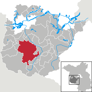 Bad Belzig in Brandenburg (Country) - District Potsdam-Mittelmark